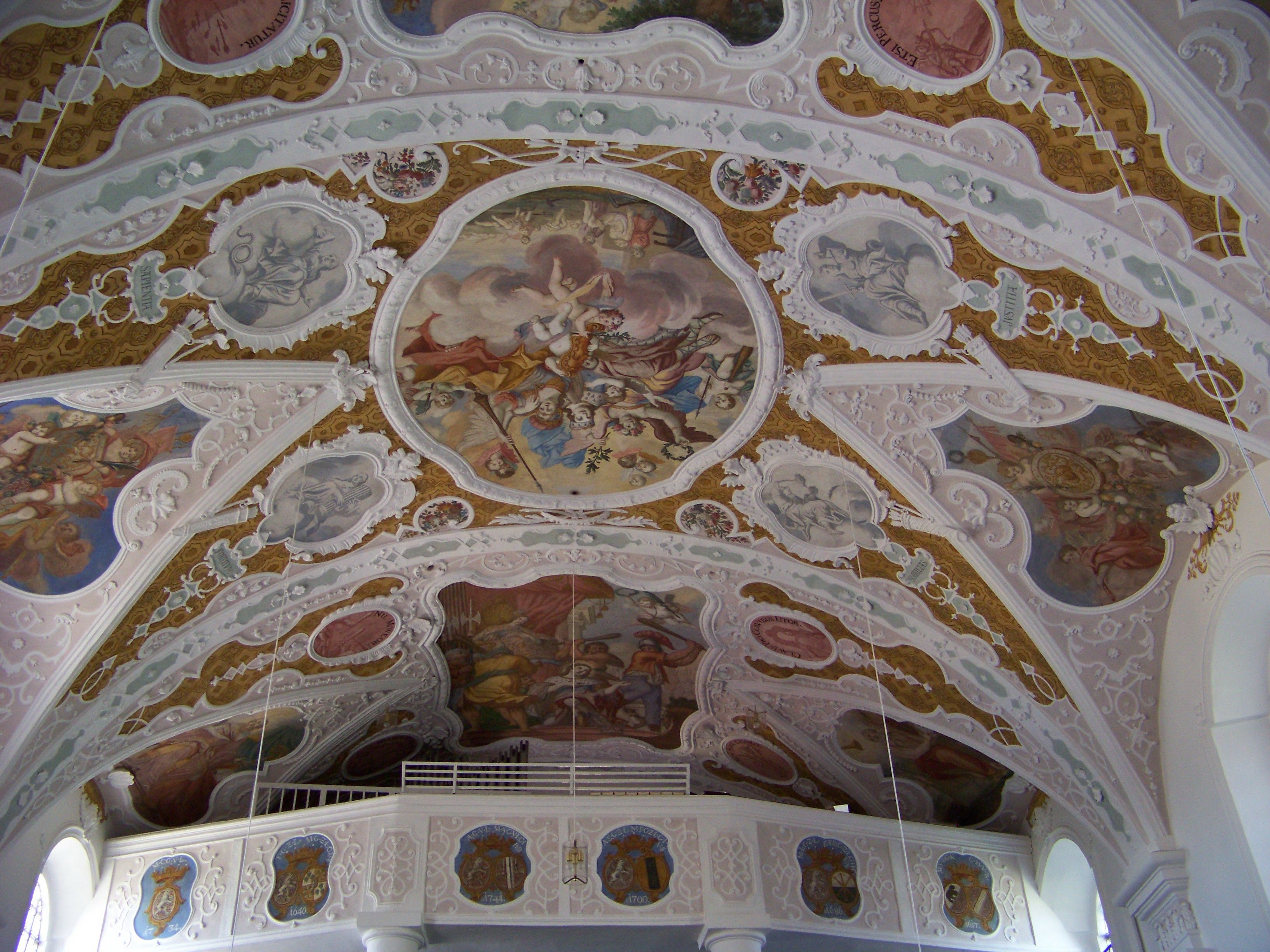 Furth bei Landshut (Niederbayern) Landshuter Straße 14. Katholische Kirche St. Sebastian. Saalkirche mit eingezogenem Chor. Spätgotische Anlage des 15. Jahrhunderts, barockisiert 1741; mit Ausstattung. Reiche Stuckaturen im Langhausgewölbe.